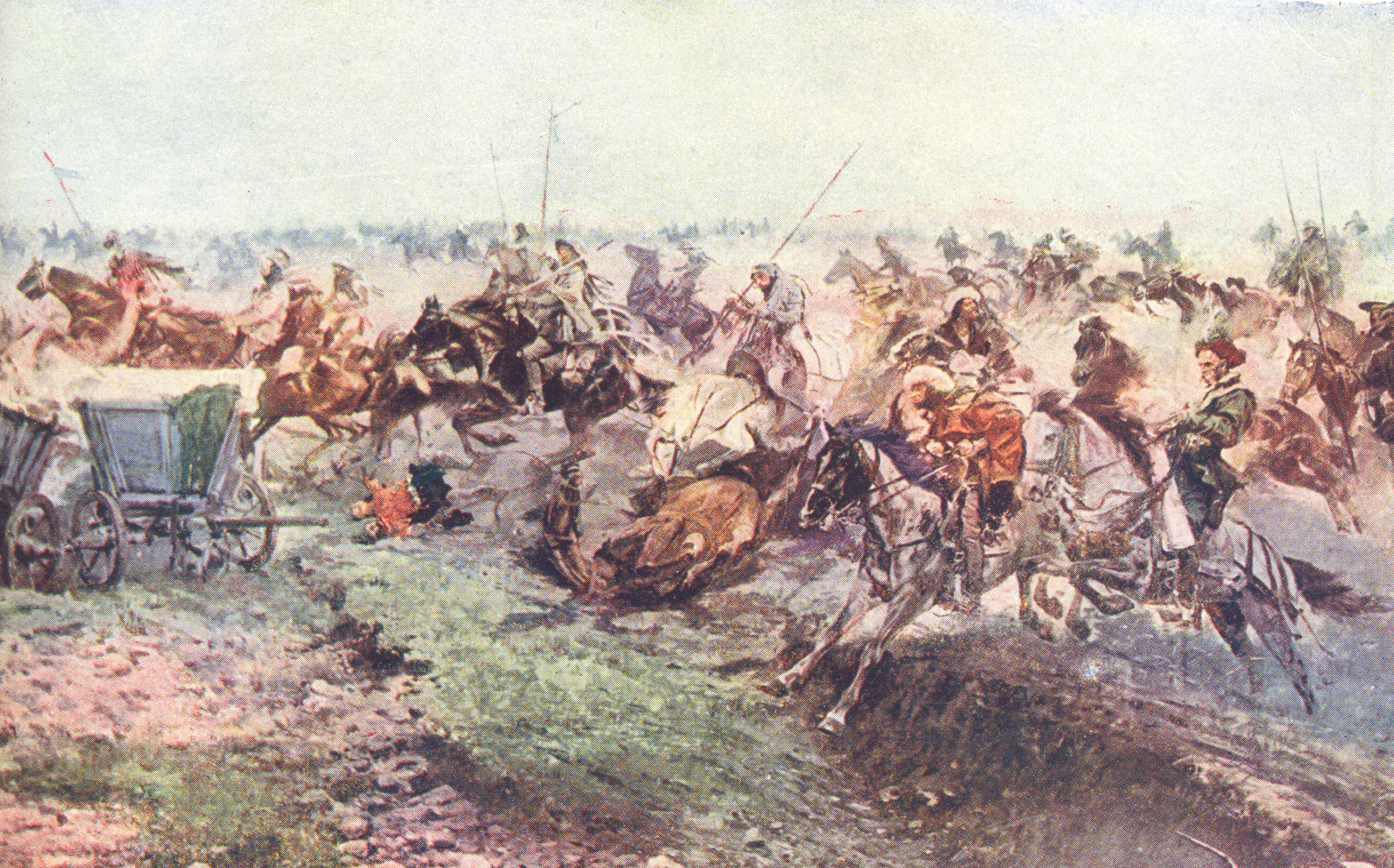 Bitva u Lipan: Prchající jízda Jana Čapka ze Sán. Výjev z Maroldova panoramatu bitvy u Lipan, jež bylo pořízeno pro Výstavu architektury a inženýrství, která se konala na Výstavišti v Praze Holešovicích v roce 1898.